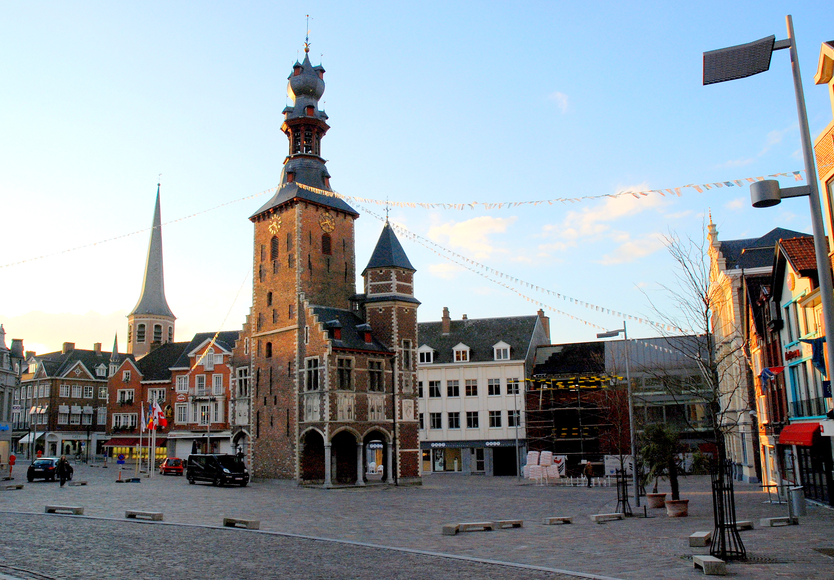 Hallentoren in Tielt, België